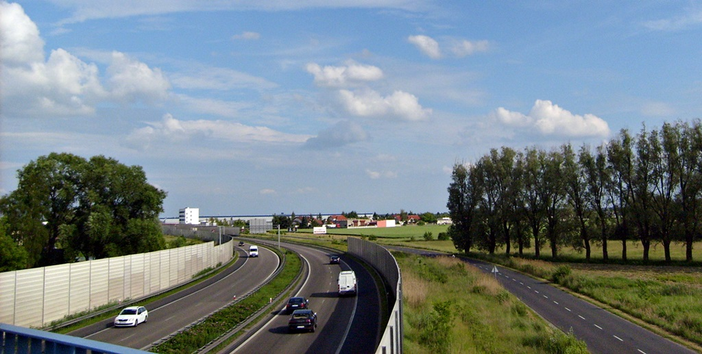 Poznań, ul. Krzywoustego widok z wiaduktu ul. Tarnowska na południe